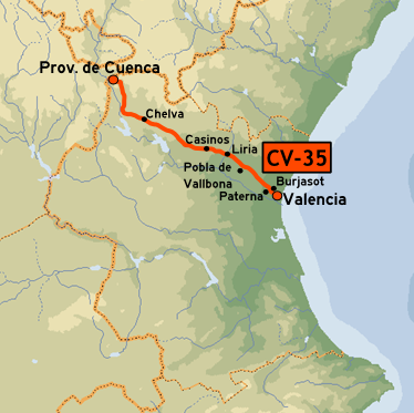 recorrido de la carretera CV-35